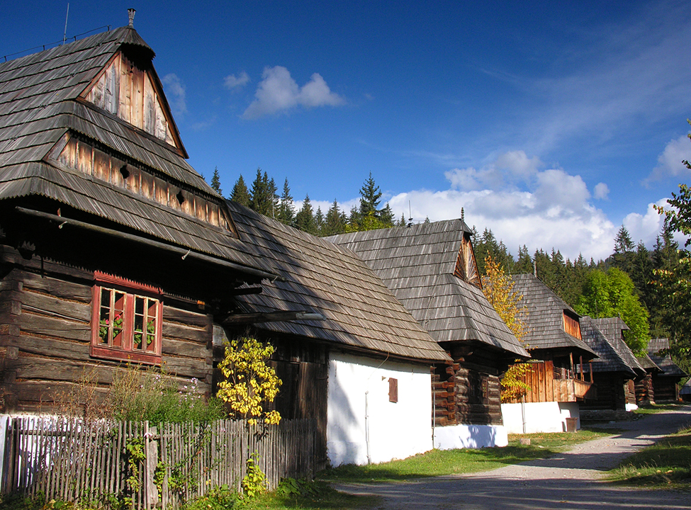 Muzeum Wsi Orawskiej Zuberec Brestowa